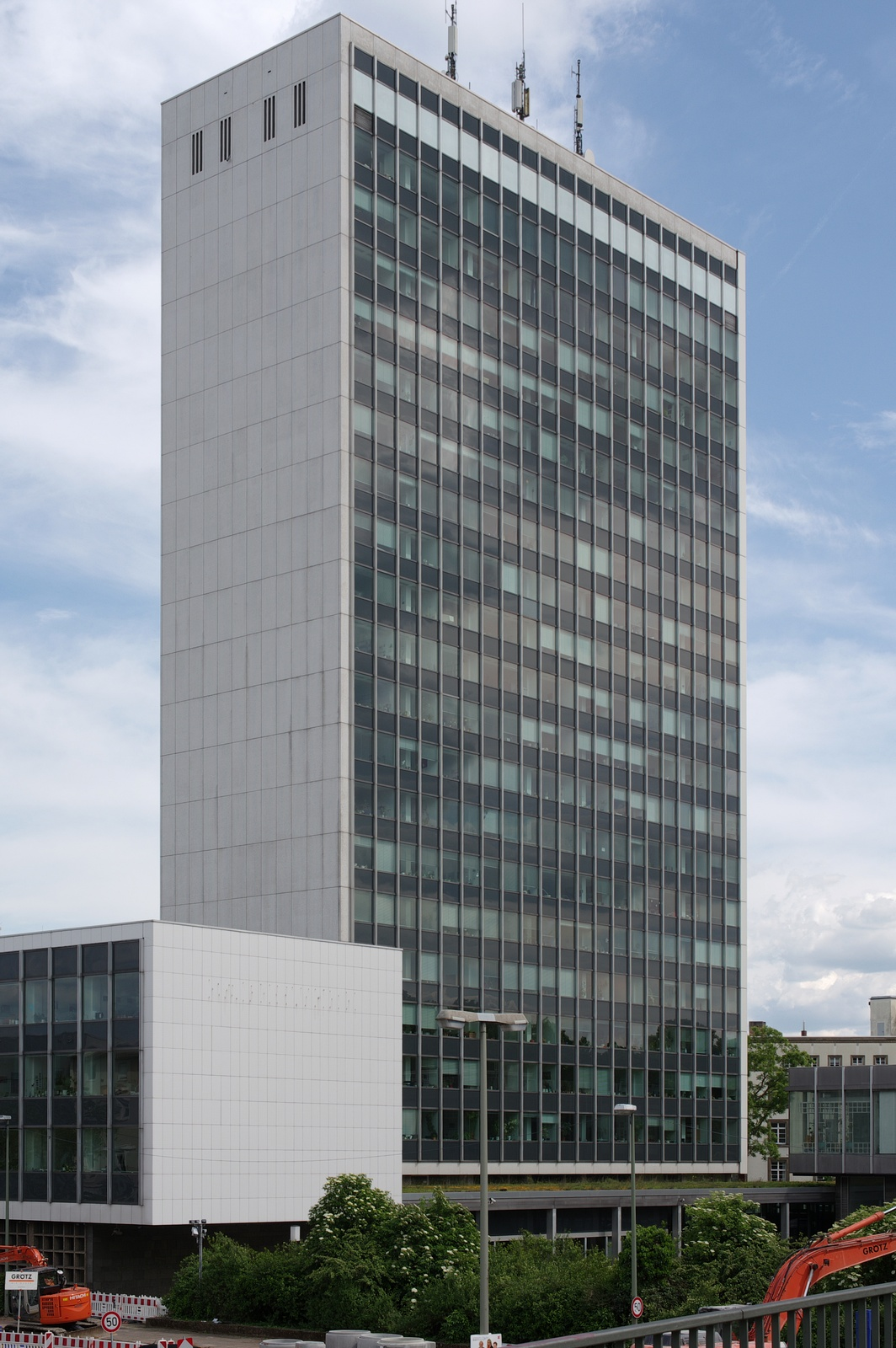 Das ehemalige Verwaltungsgebäude der Badenwerk AG, heute Landratsamt Karlsruhe.